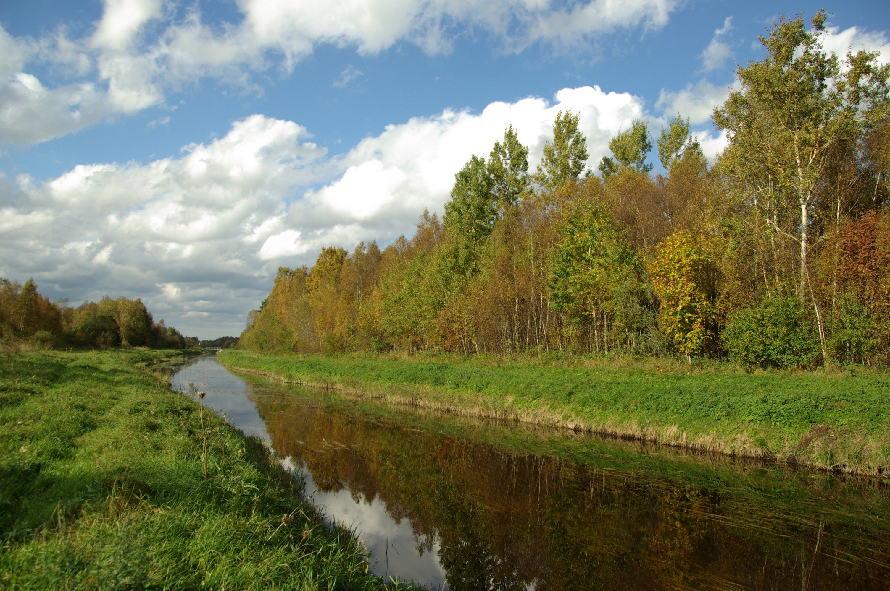 Vaskjala-Ülemiste kanal Rae vallas Rae külas